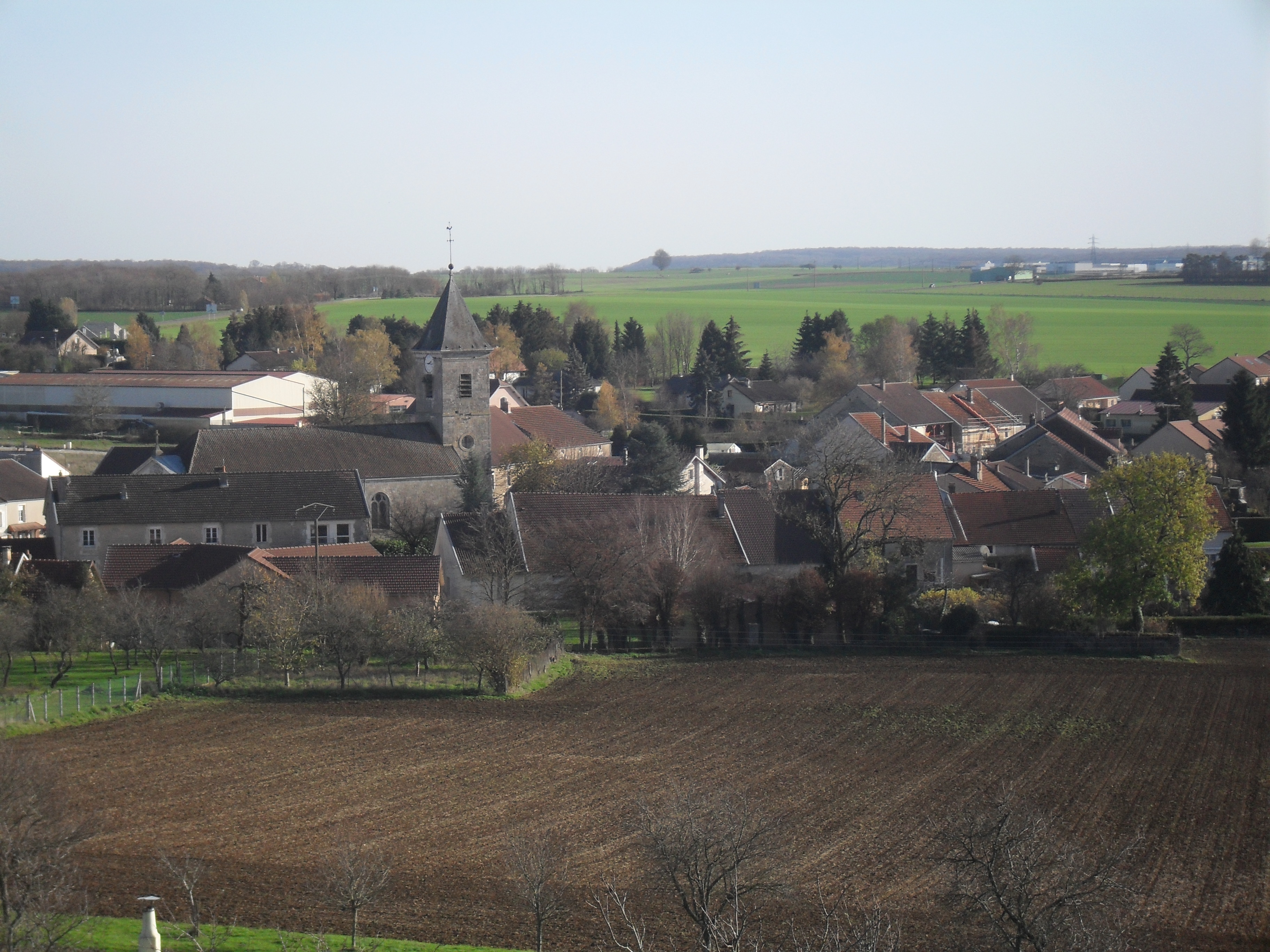 PAYSAGE DE MANDRES LA COTE